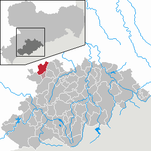 Lugau/Erzgeb. im Erzgebirgskreis, Sachsen